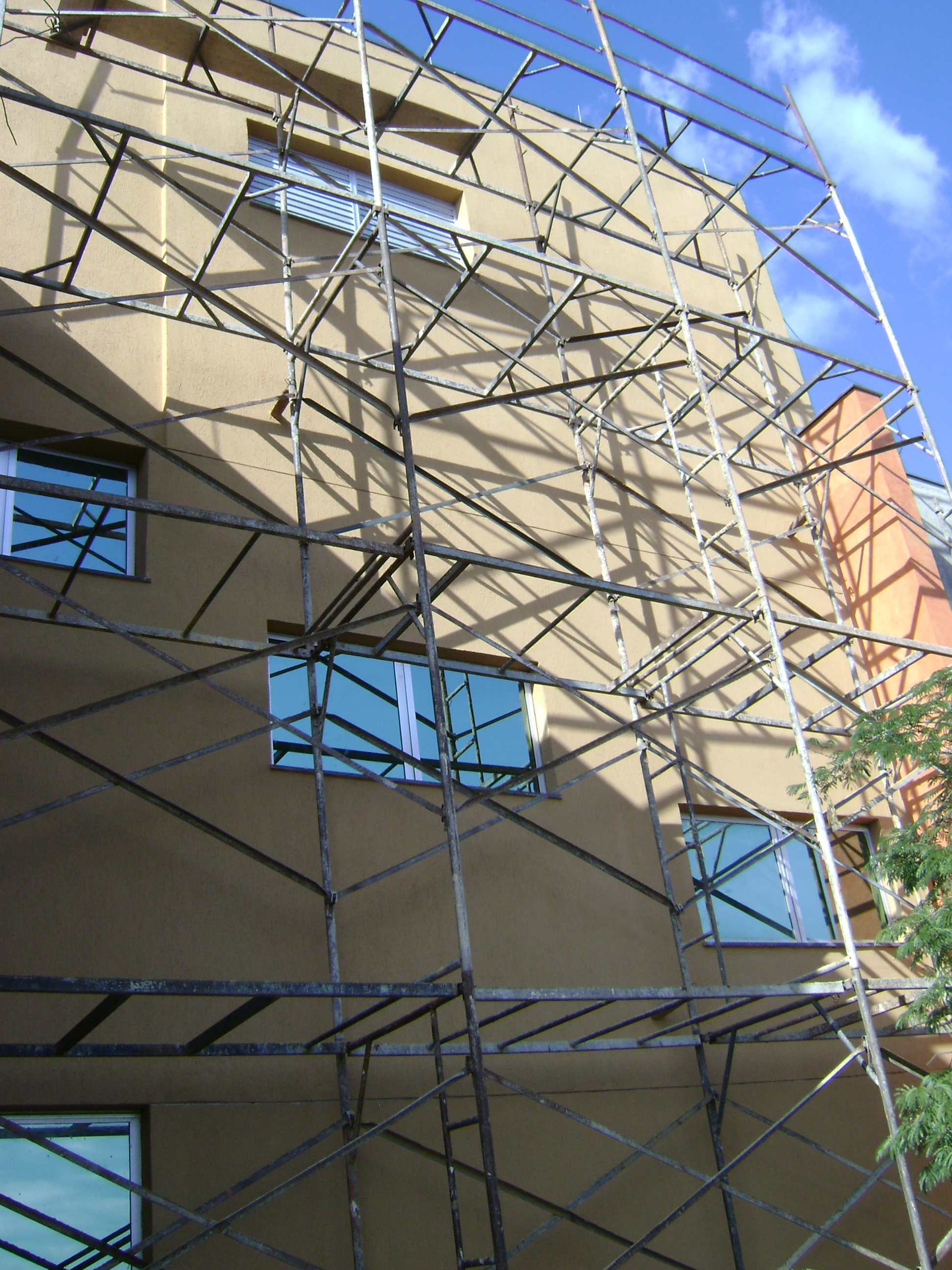 Andaimes na conclusão da construção de um prédio para o ensino da Engenharia Civil, no campus II do Cefet-MG, em Belo Horizonte, Brasil.